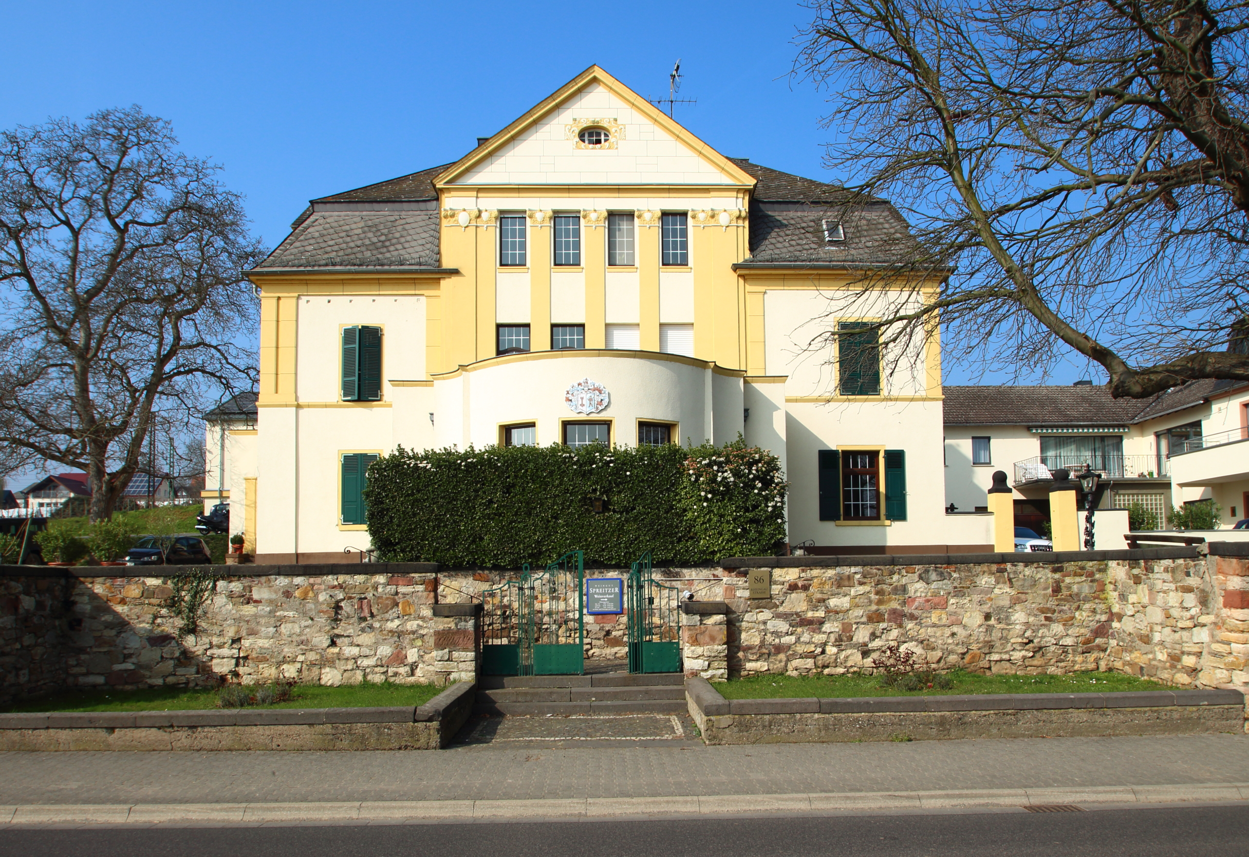 Weingut Josef Spreitzer. Gutshaus erbaut 1910 über älterem Gewölbekeller (um 1743), Oestrich im Rheingau, Hessen.